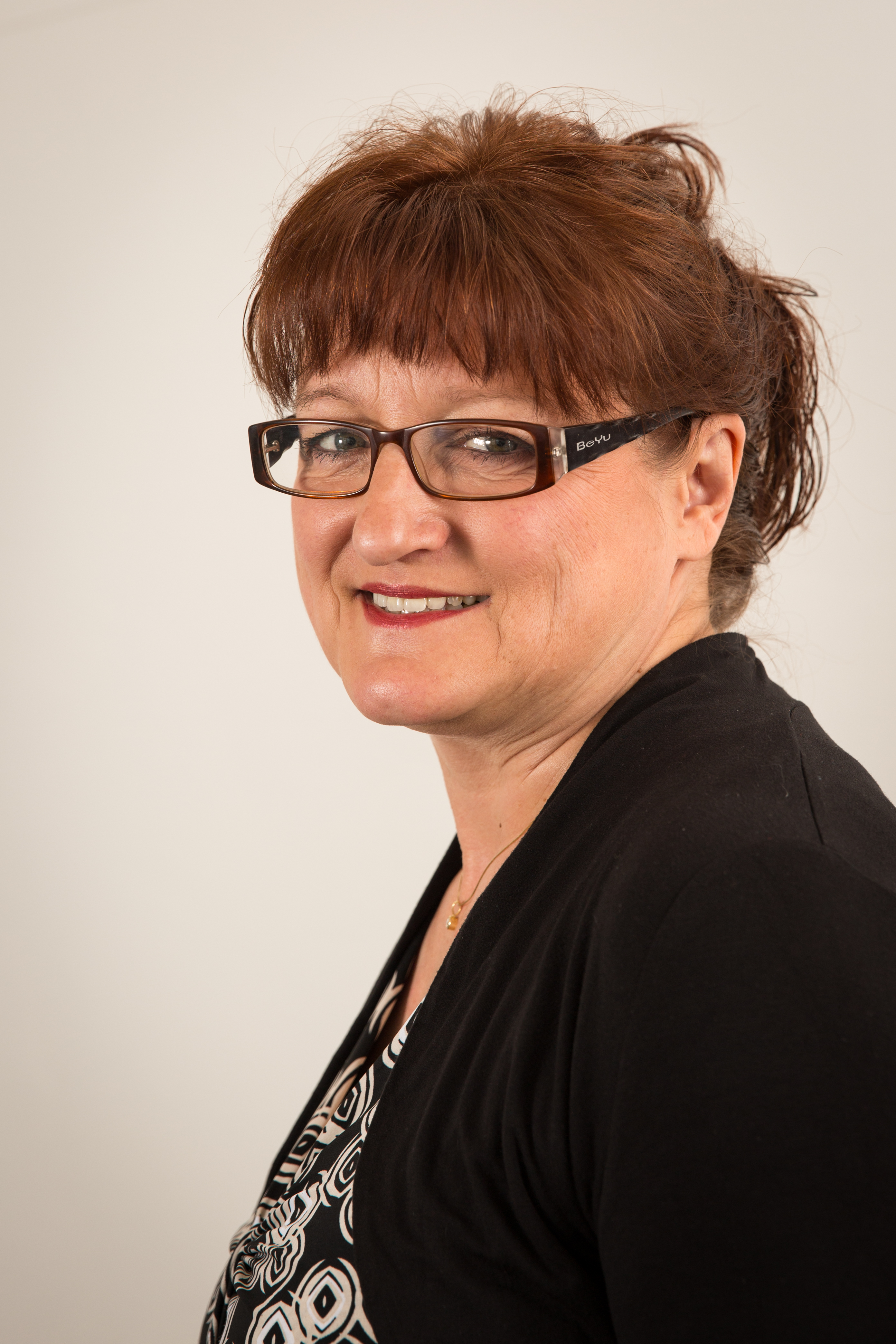 Die saarländische Landtagsabgeordnete Petra Fretter